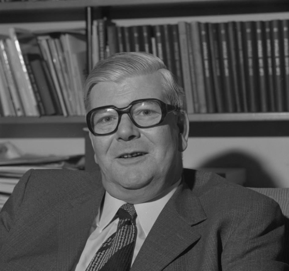 Portret van Piet Wisse, burgemeester van Wissenkerke.